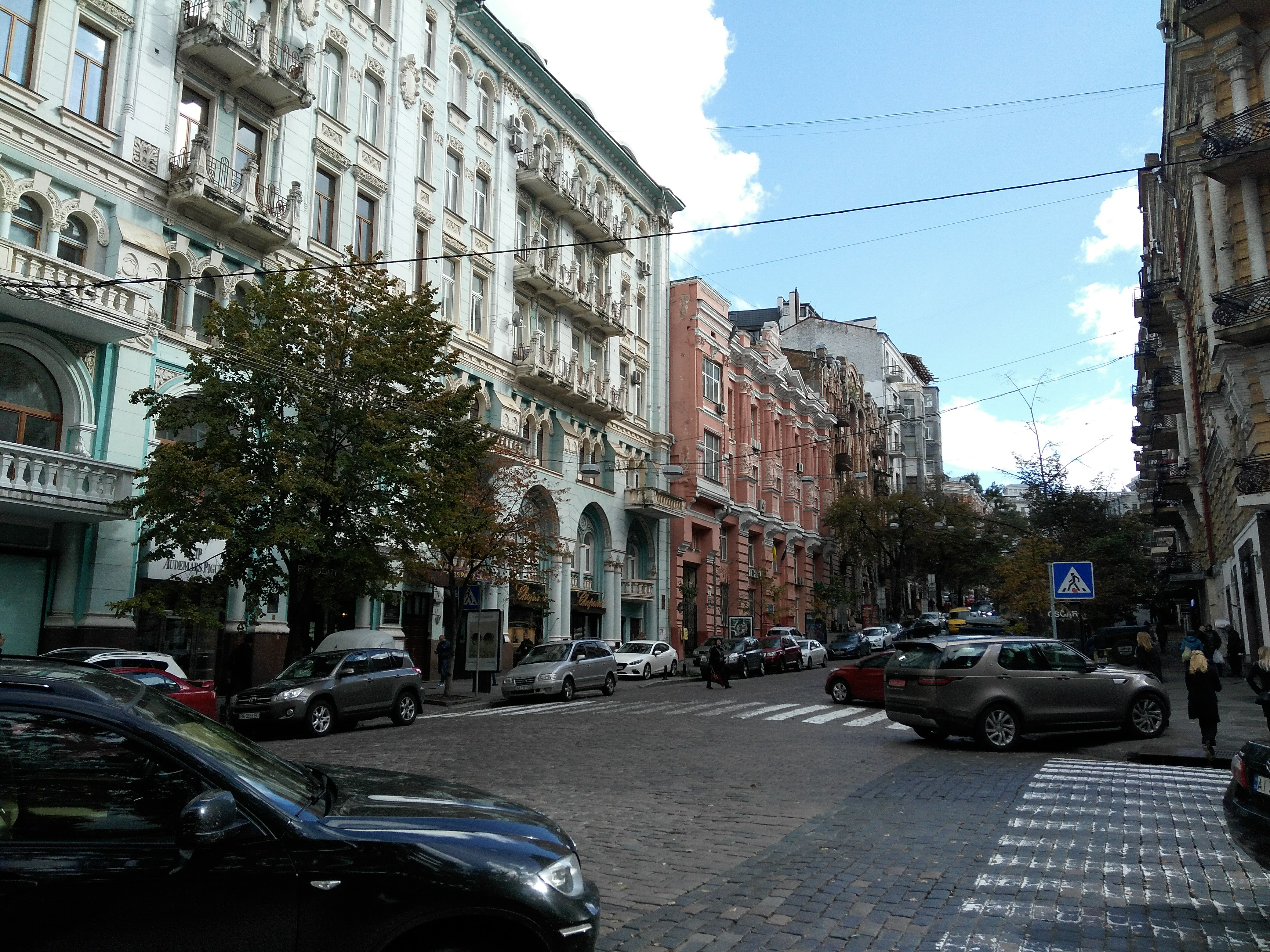 вул. Архітектора Городецького, Київ